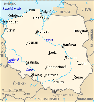 Orientační mapa Polska.